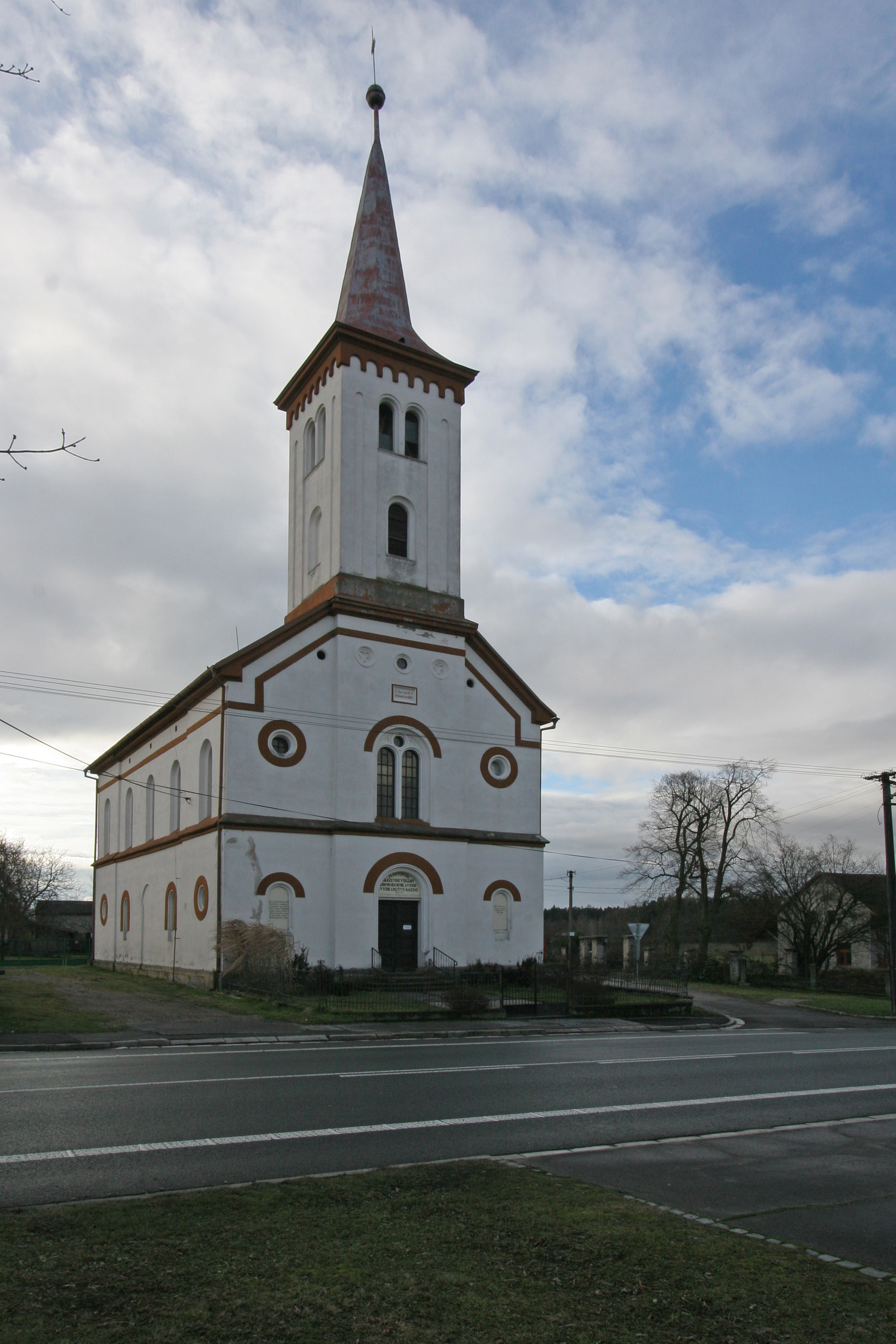 Bukovka evangeliický kostel